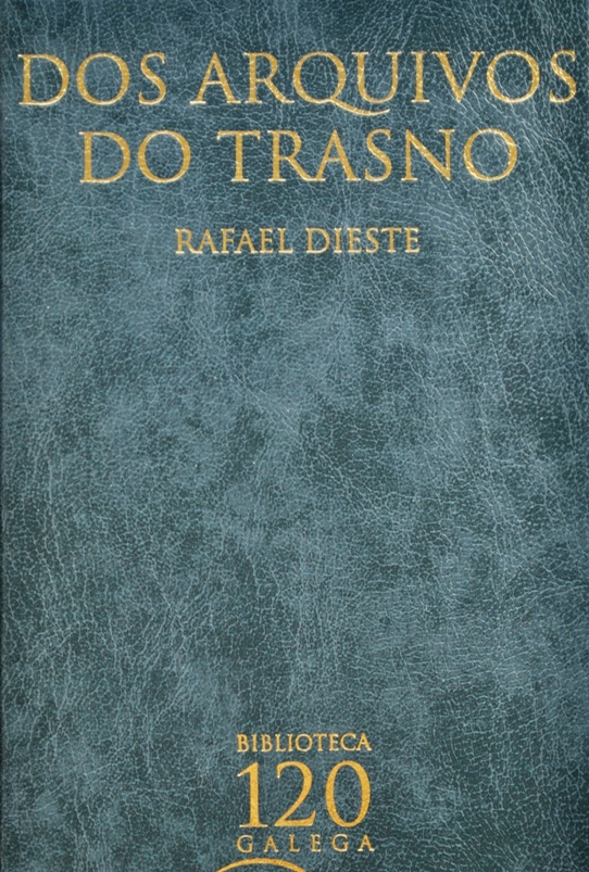 Detalle da portada dun volume de Dos arquivos do trasno de Rafael Dieste, da Biblioteca Galega 120.